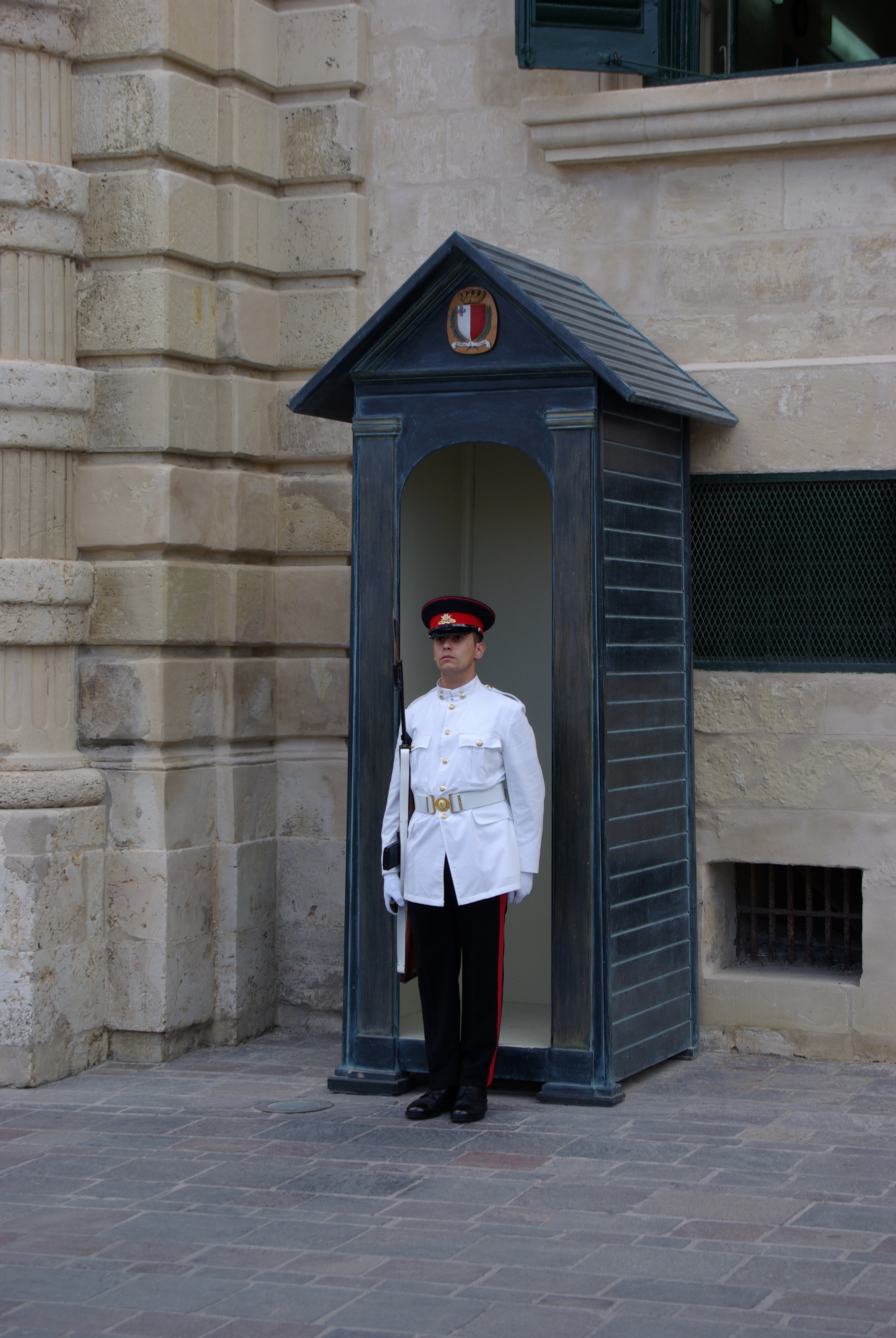 Malta Valletta, Wache vor dem Großmeisterpalast